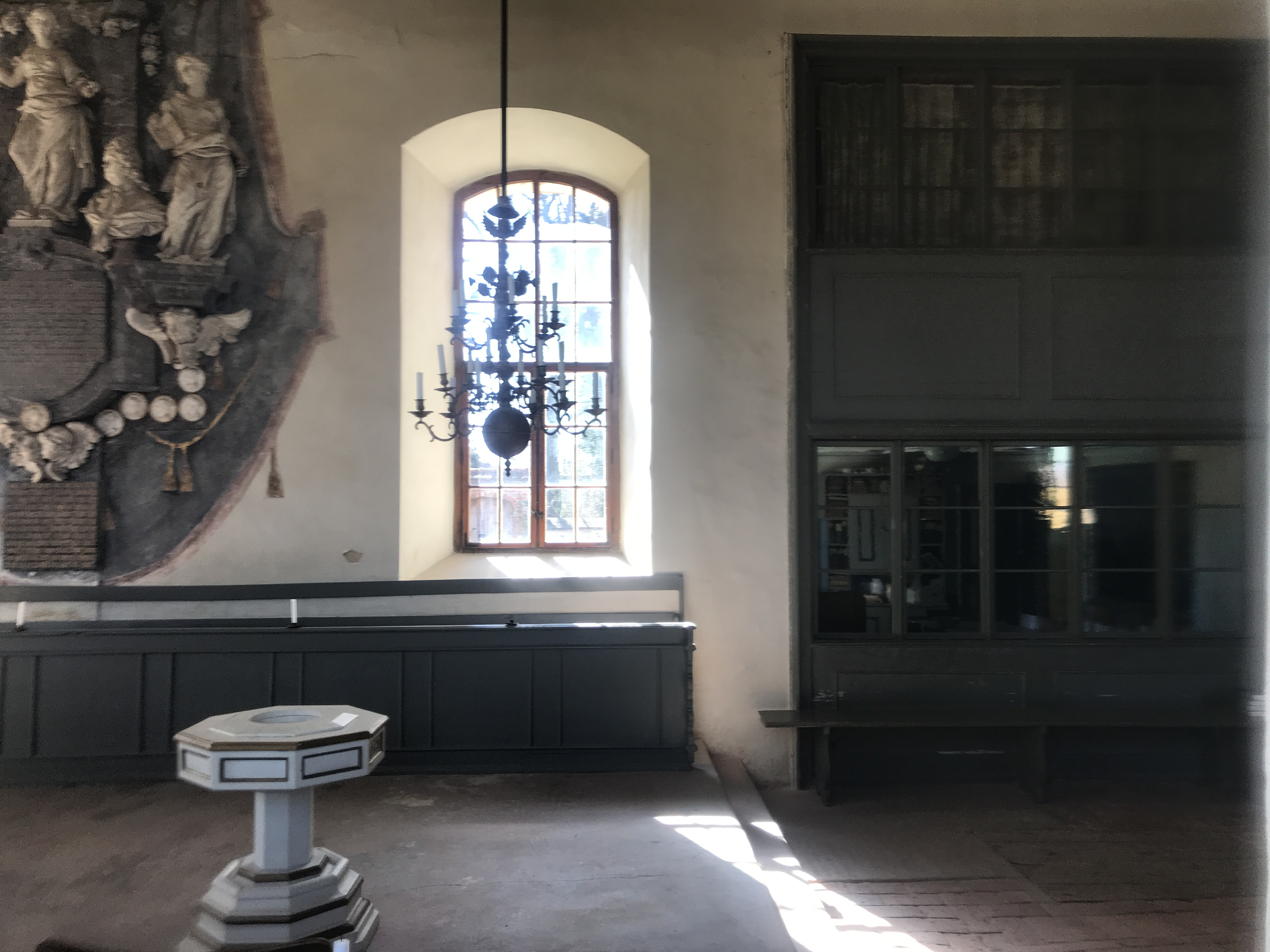 Die Feldsteinkirche Groß Jehser entstand vermutlich im 15. Jahrhundert und steht in Calau im Landkreis Oberspreewald-Lausitz in Brandenburg.